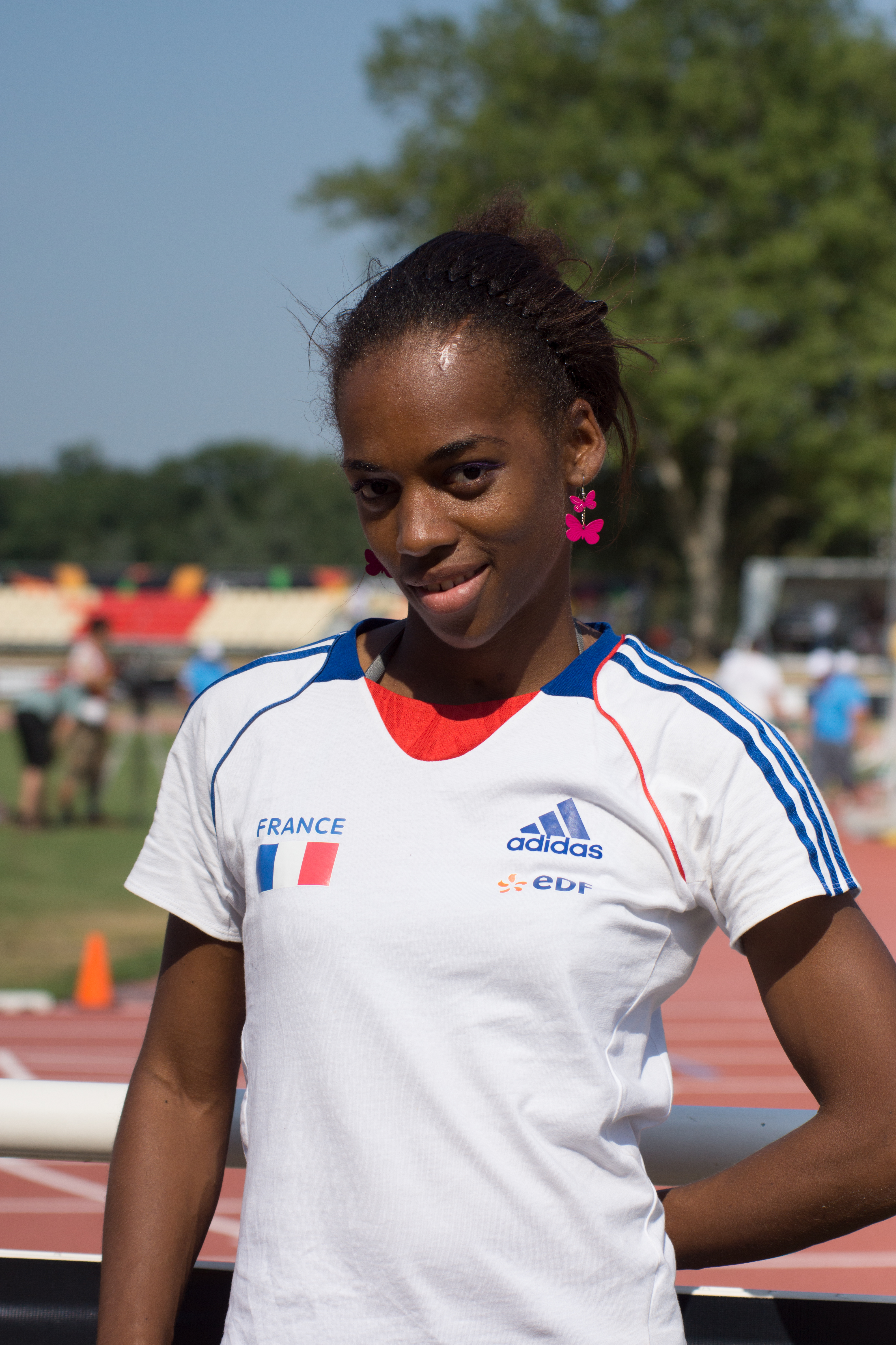 Mandy François-Elie lors des championnats du monde d'athlétisme IPC 2013.